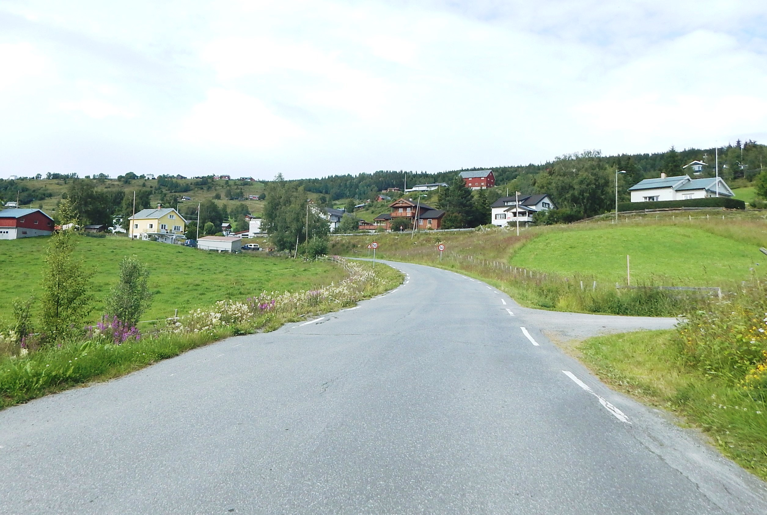 Garlivegen på Leira